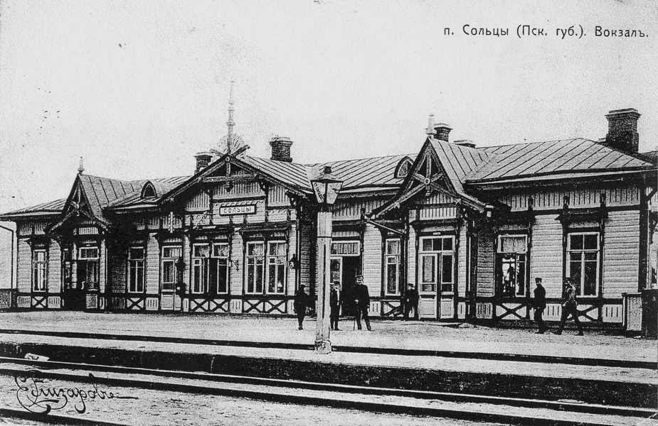 Вокзал станции Сольцы Московско-Виндаво-Рыбинской ж. д. Псковская губерния. Открытка дореволюционная